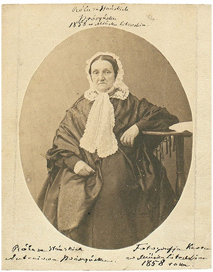 А. Прушынскі. Партрэт маці - першая беларуская фатаграфія. 1858